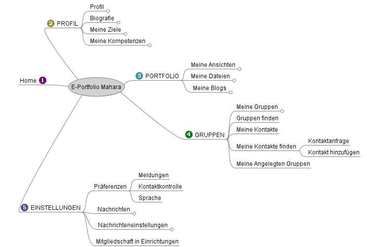 Mahara Mind-Map